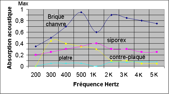 courbe